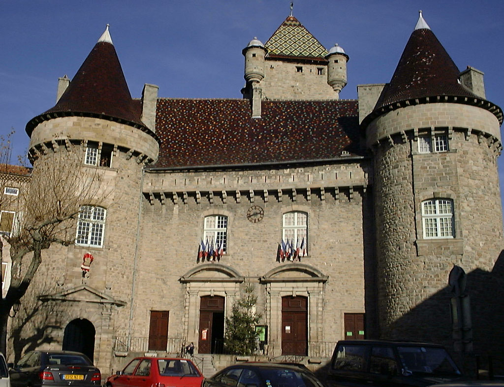 Le château d'Aubenas